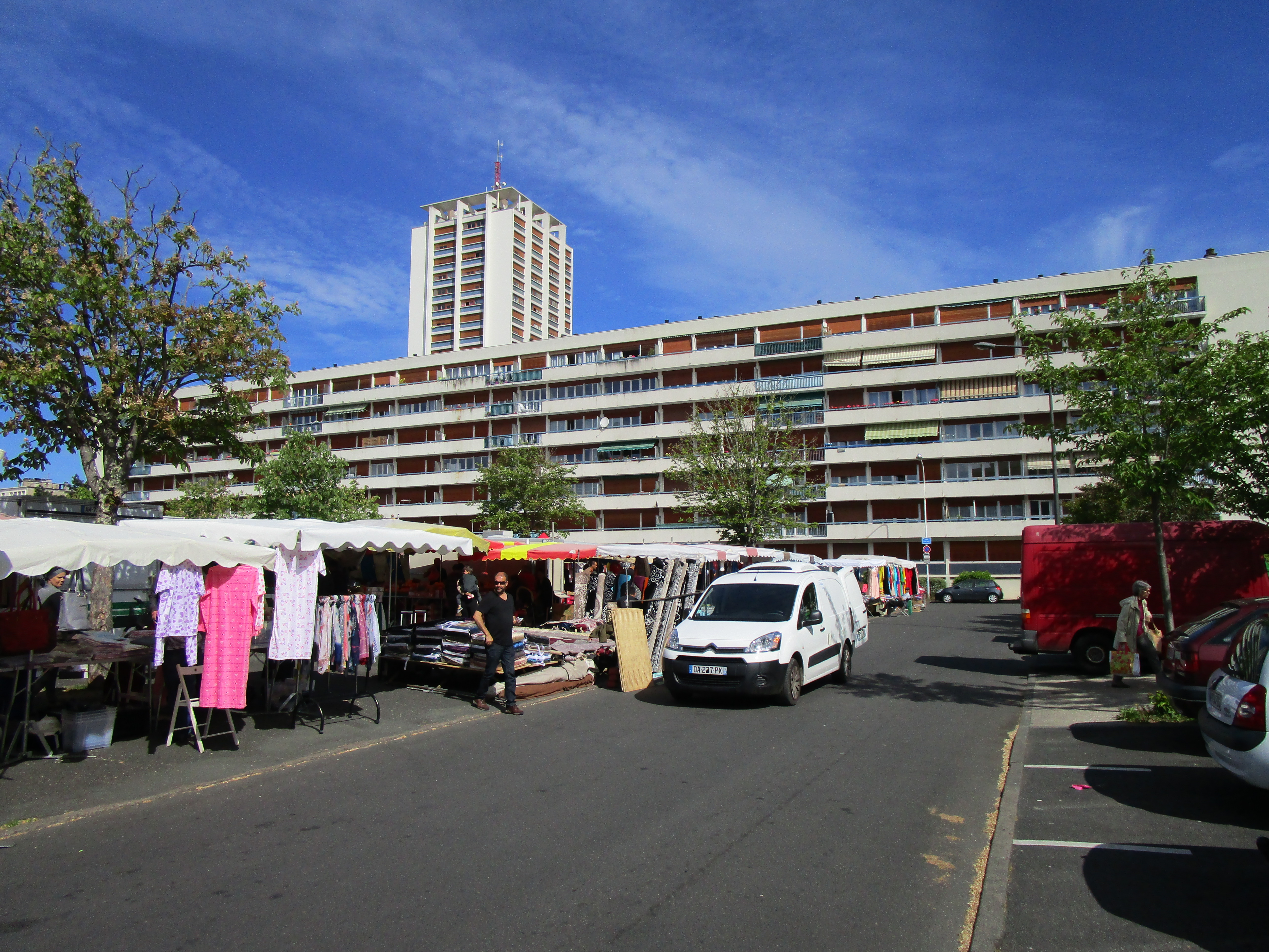 Marché de la place Saint-Paul, dans le quartier du Sanitas de Tours